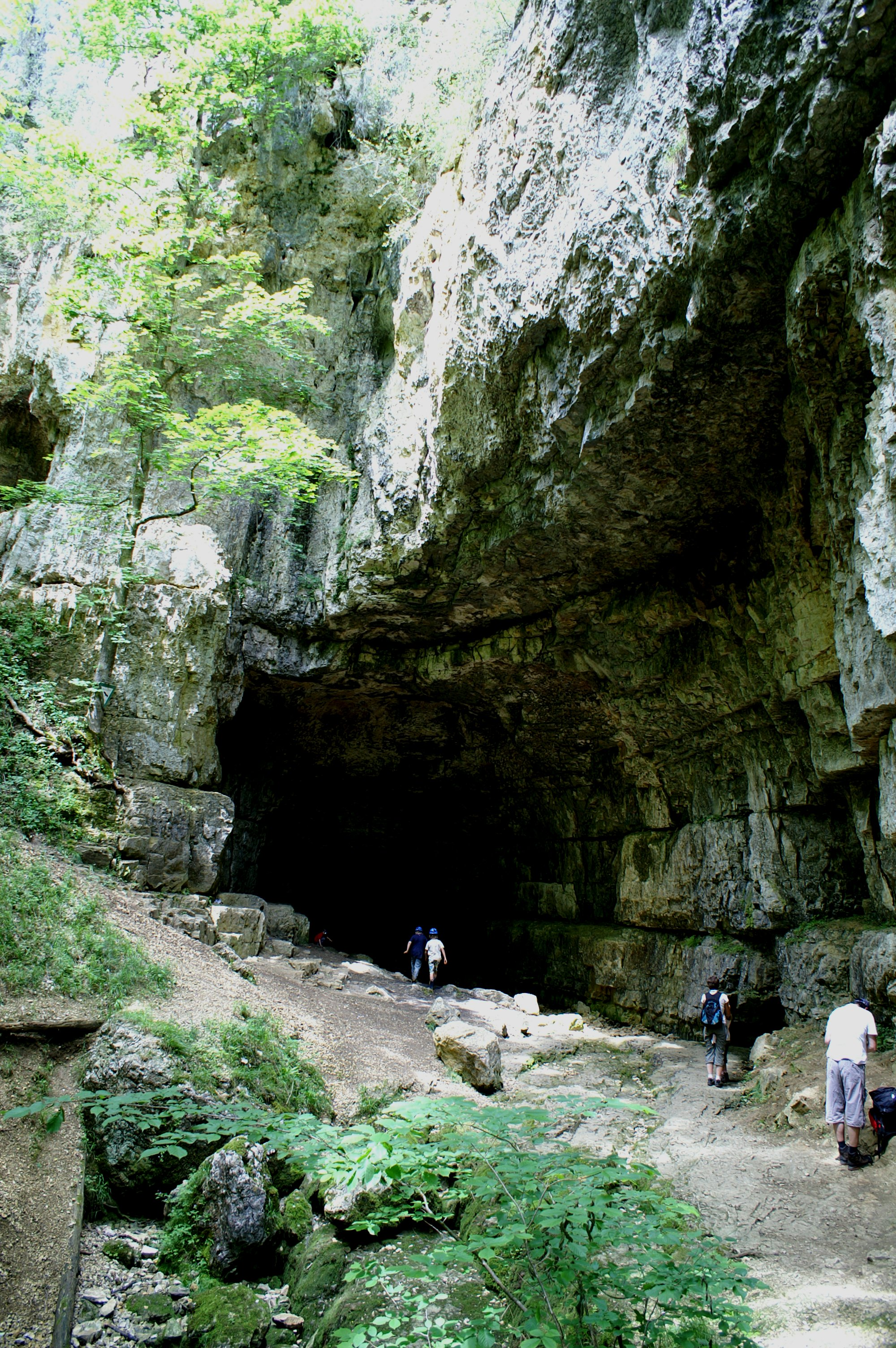 Eingang zur Falkensteiner Höhle bei Grabenstetten auf der Schwäbischen Alb